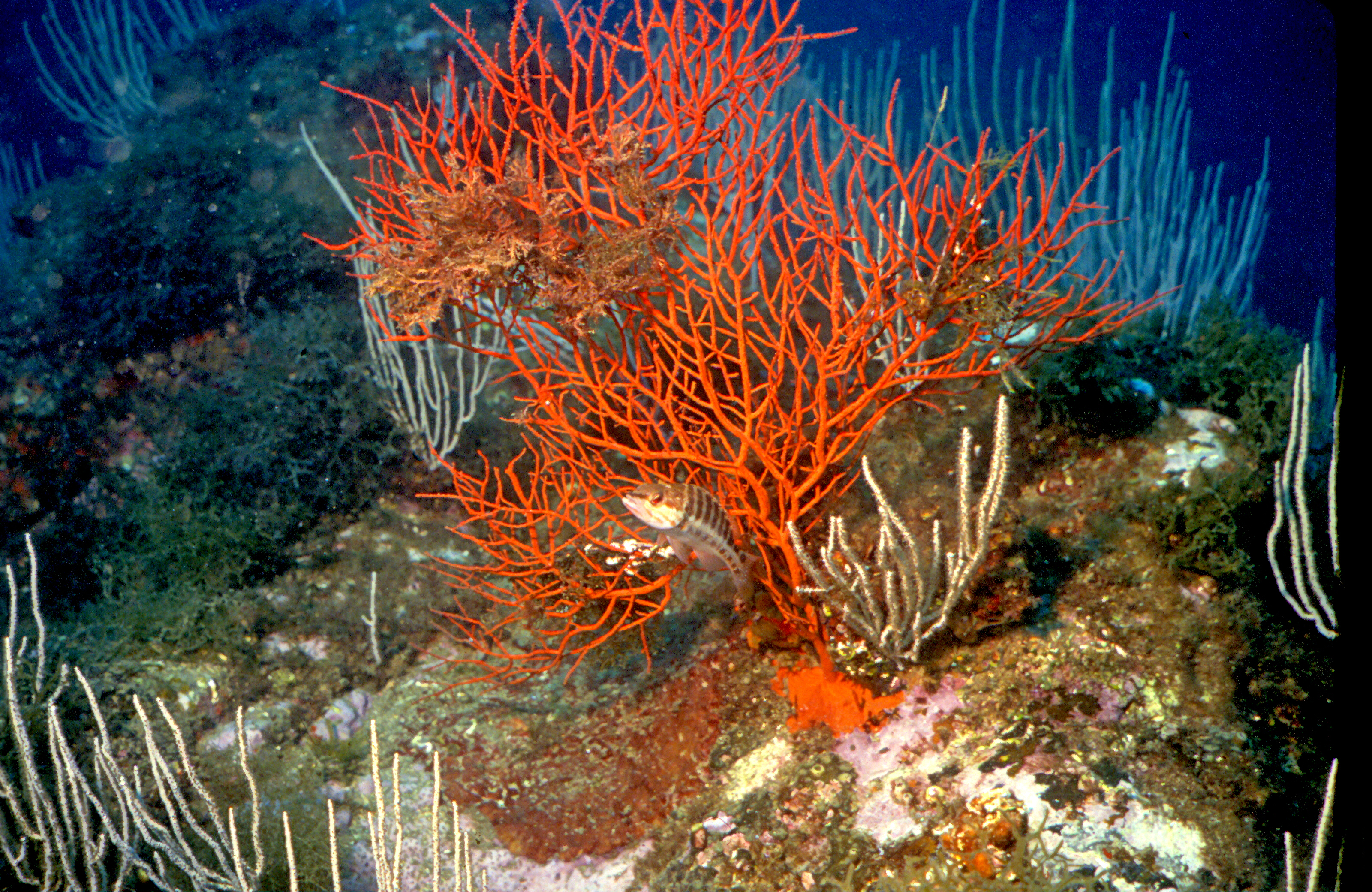 Leptogorgia sarmentosa (Esper, 1791), Eunicella singularis (Esper, 1794), Serranus cabrilla (Linnaeus, 1758) - Banyuls-sur-Mer : 07/88